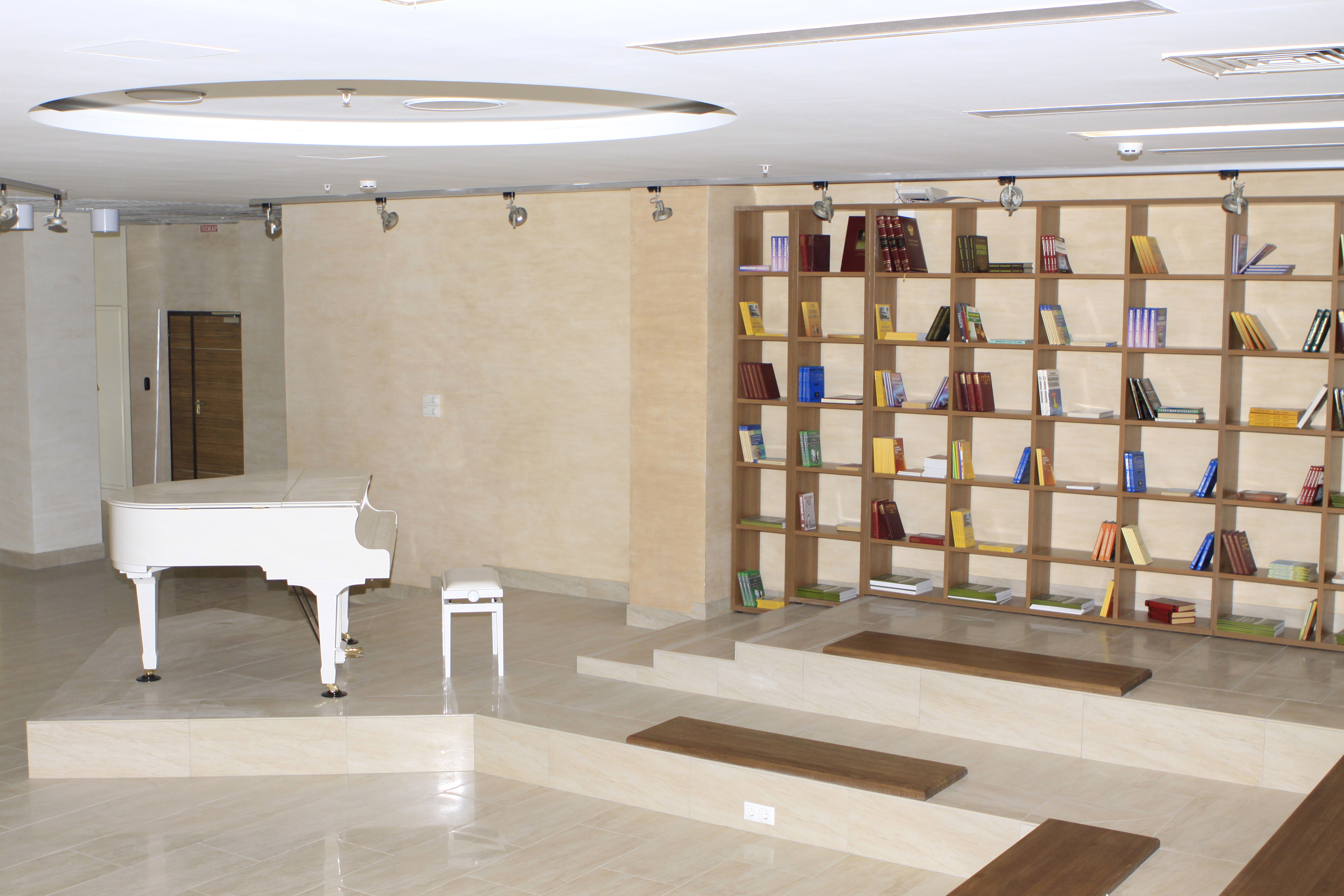 Мытищи